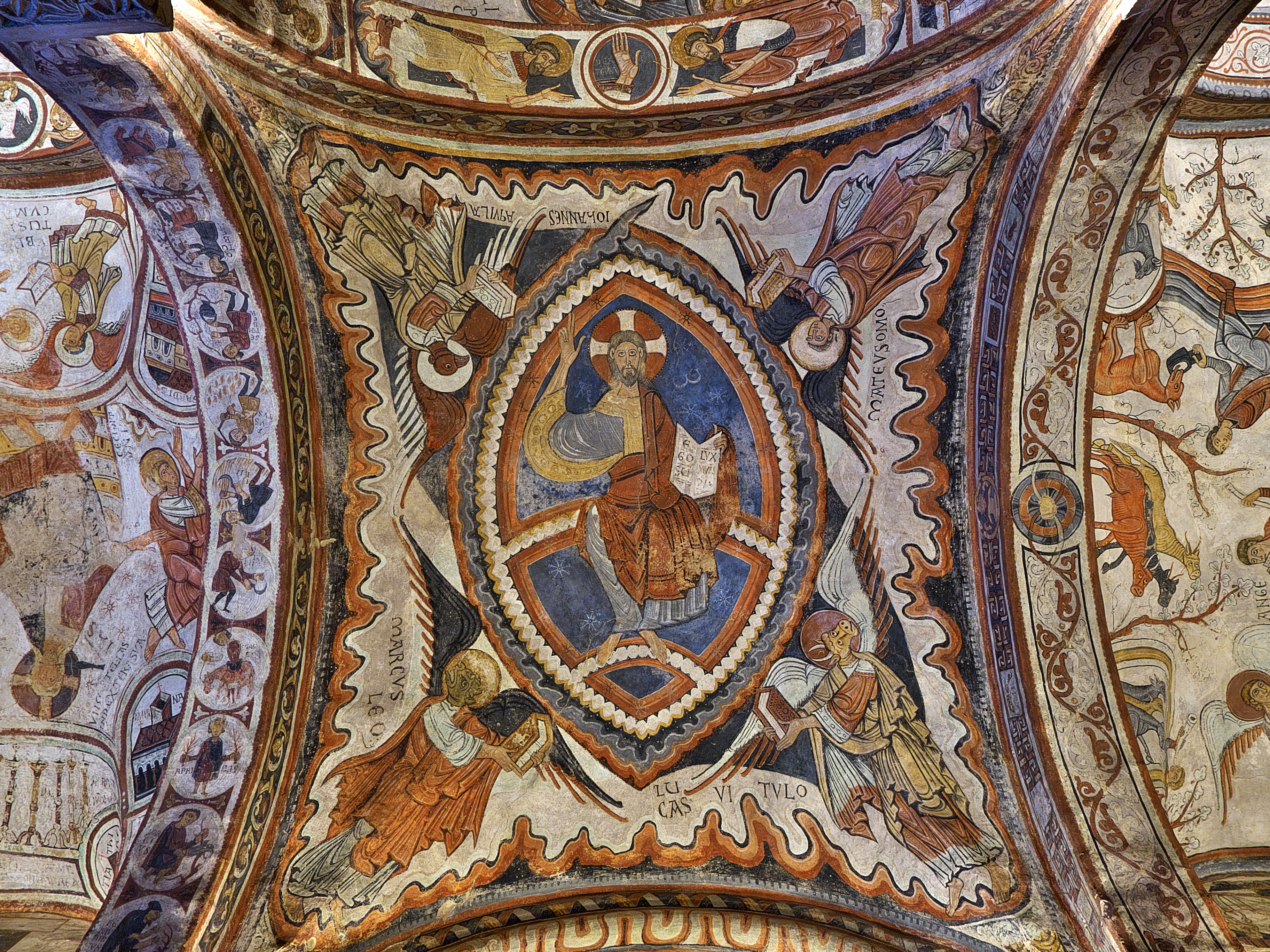 Bóveda central del Panteón Real (ca. 1149). Extraordinaria pintura, de influencias francesas, al temple sobre estuco blanco de Cristo en Majestad (Maiestas Domini) y el Tetramorfos.